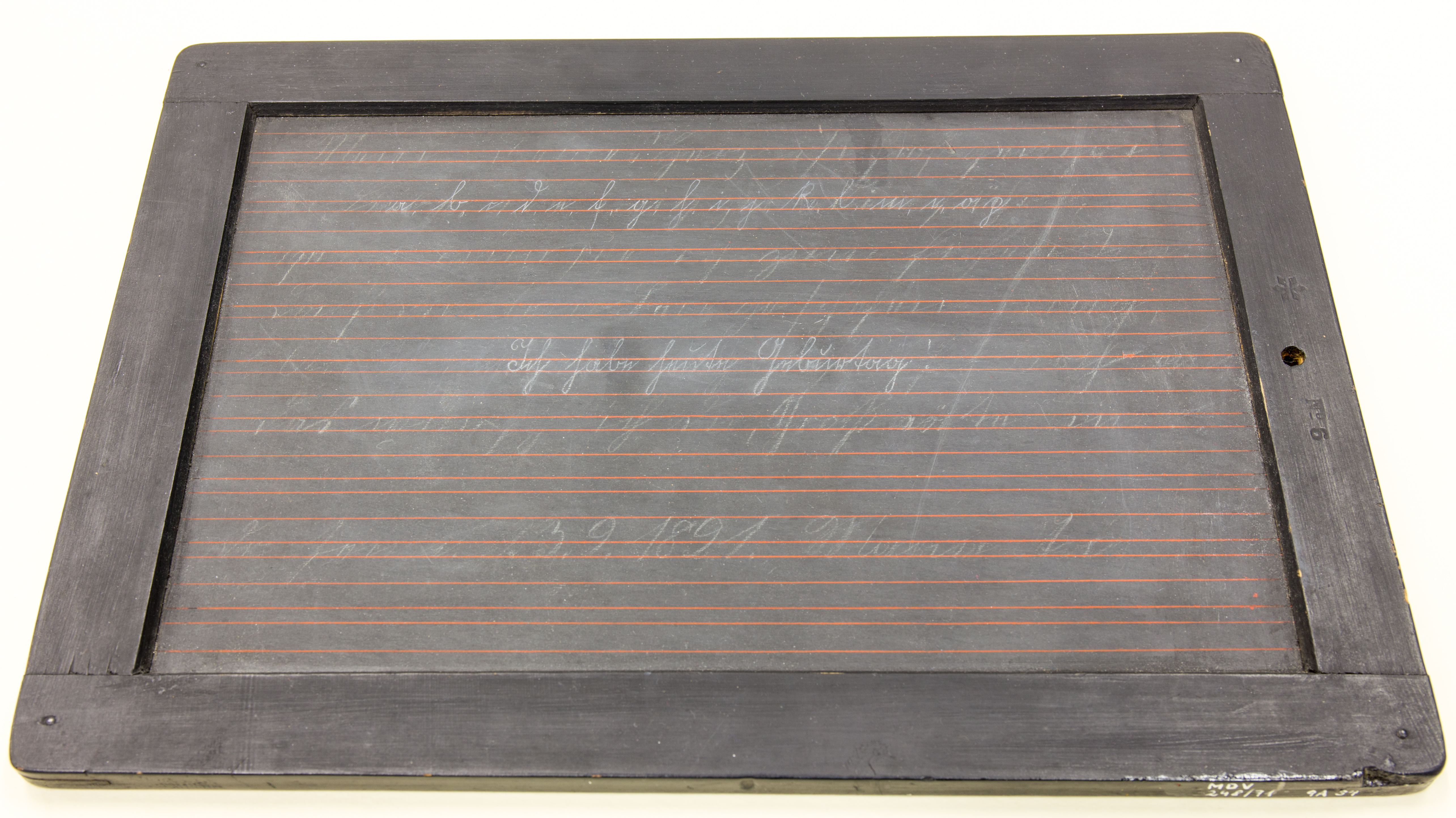 Schiefertafel Indetifikations-Nr.: D (9 A 34) 248/1971 Datierung: 1894 Herkunft: Berlin Höhe x Breite: 32,5 x 23 cm Ausgabe: Holz, Schiefertafel (schwarz) Zustand: 1. unbedenklich / gut Beschreibung: In einem rechteckigen schwarzen Holzrahmen mit abgerundeten Ecken ist eine schwarze Schiefertafel eingelassen. Auf einer Seite ist sie kariert (rote Linien, die andere liniert. Auf letzter steht in Kurrentschrift in kaum leserliches Gedicht mit Kreide. Text des Gedichtes: „Mein Herz ist froh gerührt in Liebe, die mich zu Dir führt; Heut (?) nun (?) seh (?) ich zum frohen Tag; dass Dir kein Leid Geschen mag, das wünsch ich Dir, Großväterlein.“